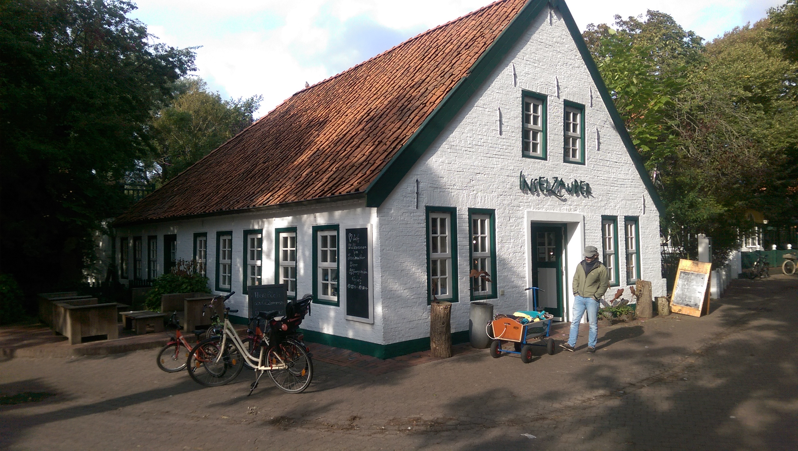 Buchhandlung Souvenirladen auf Spiekeroog, Noorderloog